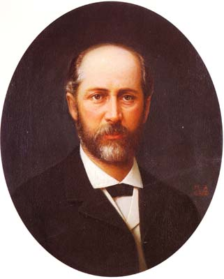 Retrato de José Francisco Vergara (1833-1889), el politico y fundador de Viña del Mar que construyó la Quinta Vergara